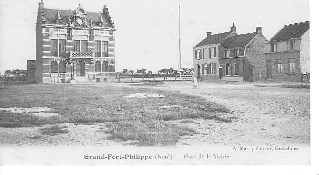 Mairie Grand-Fort-Philippe (date inconnue)